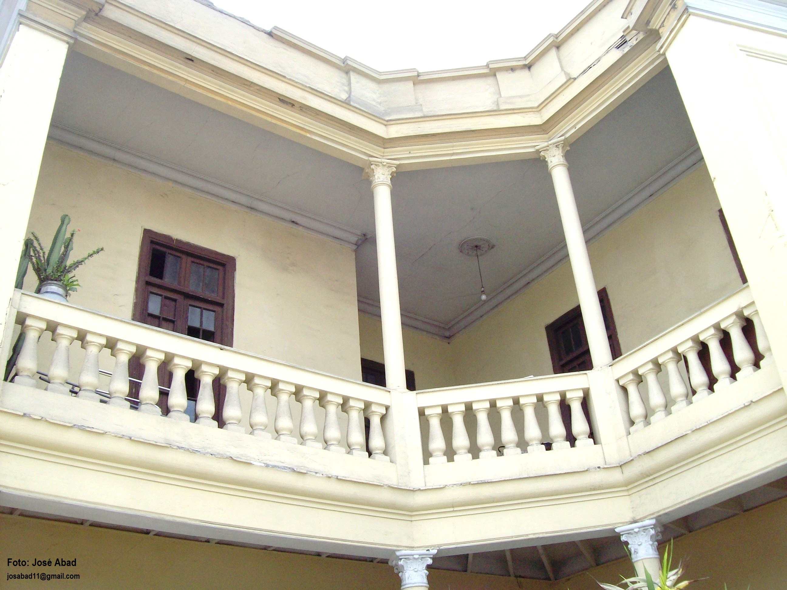 Vista del segundo piso de la casona situada en la esquina de la Avenida Arica con el Jirón Huaraz, en el distrito de Breña.